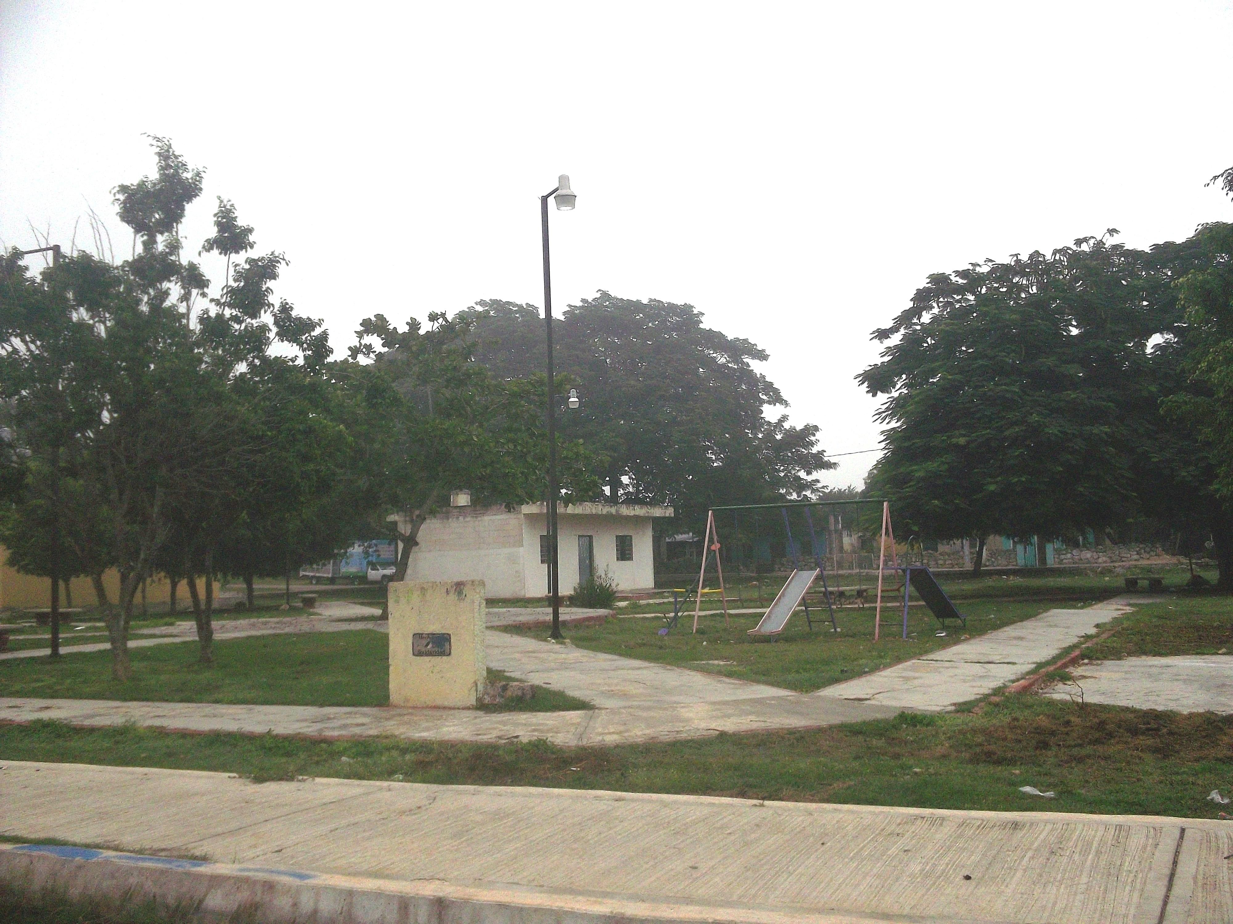 Parque principal de Tanil, Yucatán.